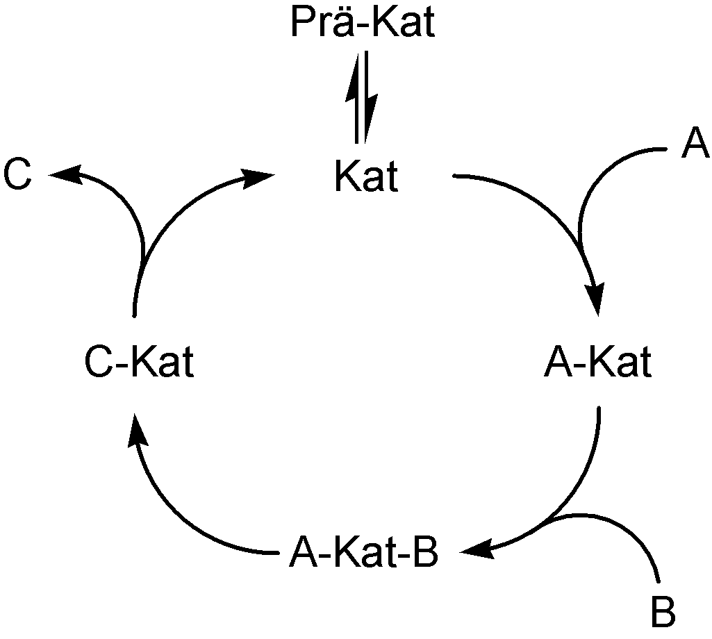 allgemeiner Katalysezyklus